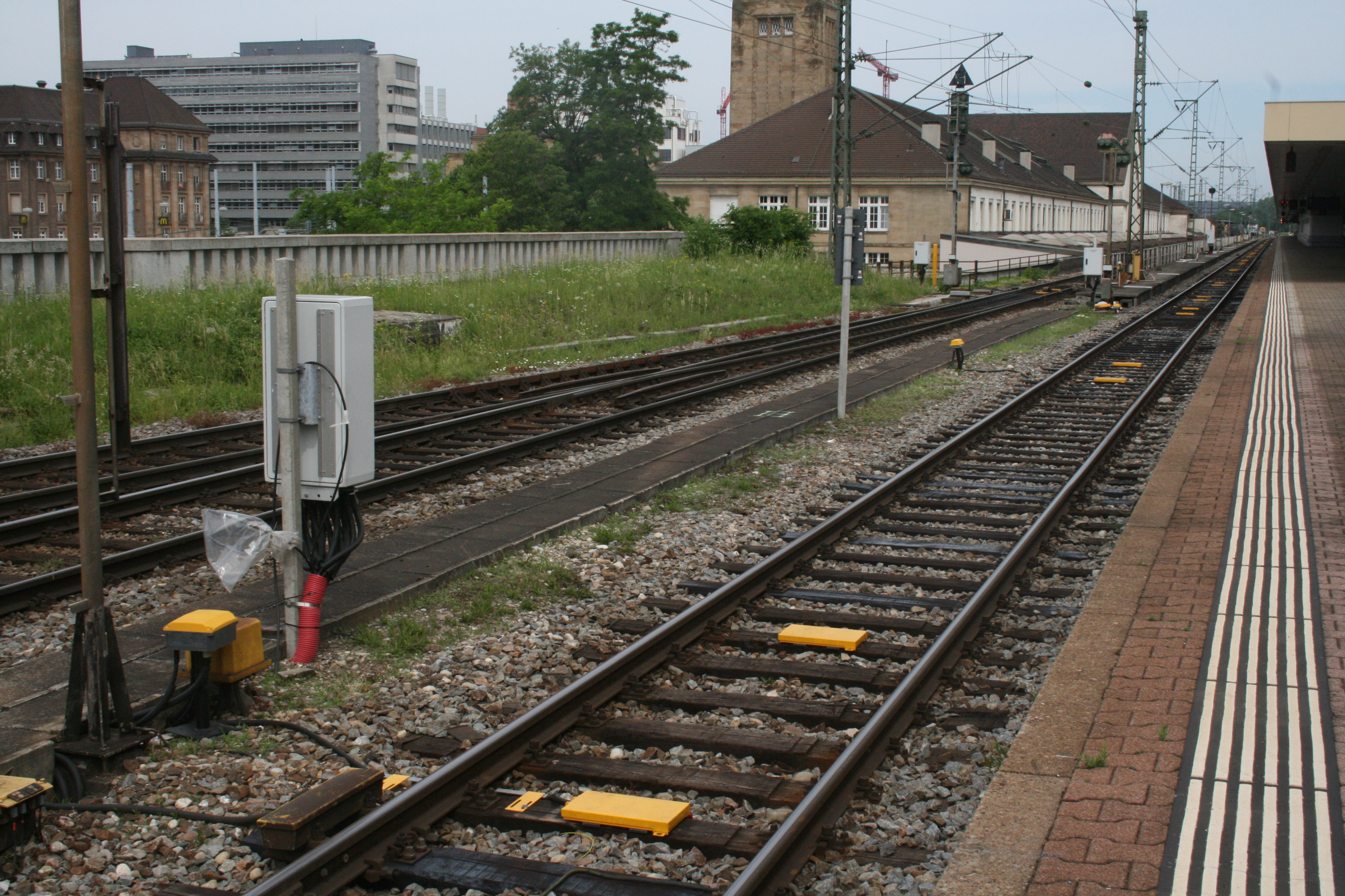 Eurobalisen (für ETCS Level 1 LS) im nördlichen Teil des Bahnsteiggleises 2 in Basel Badischer Bahnhof